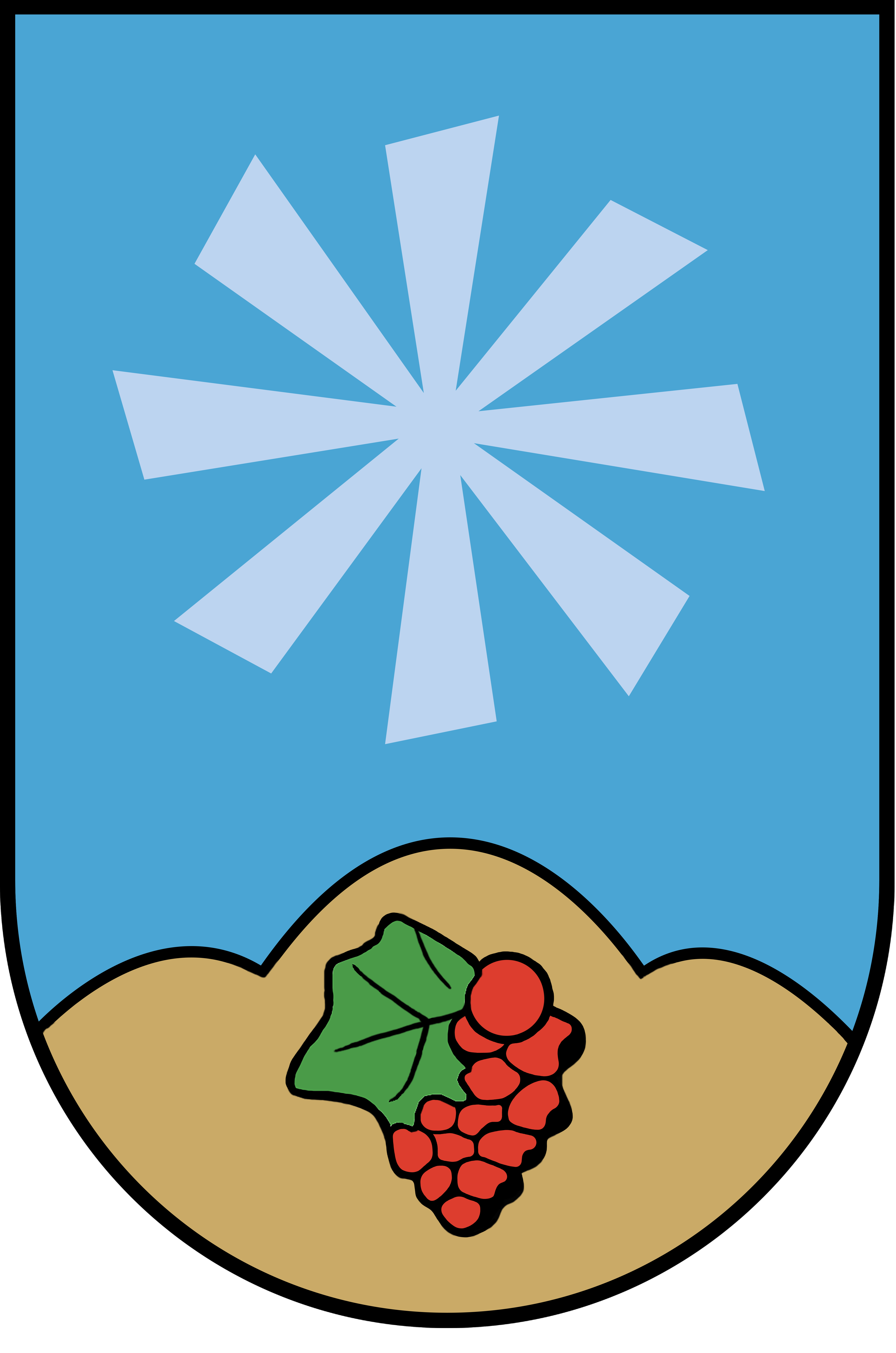 Wappen der Gemeinde Kitzeck im Sausal in Österreich